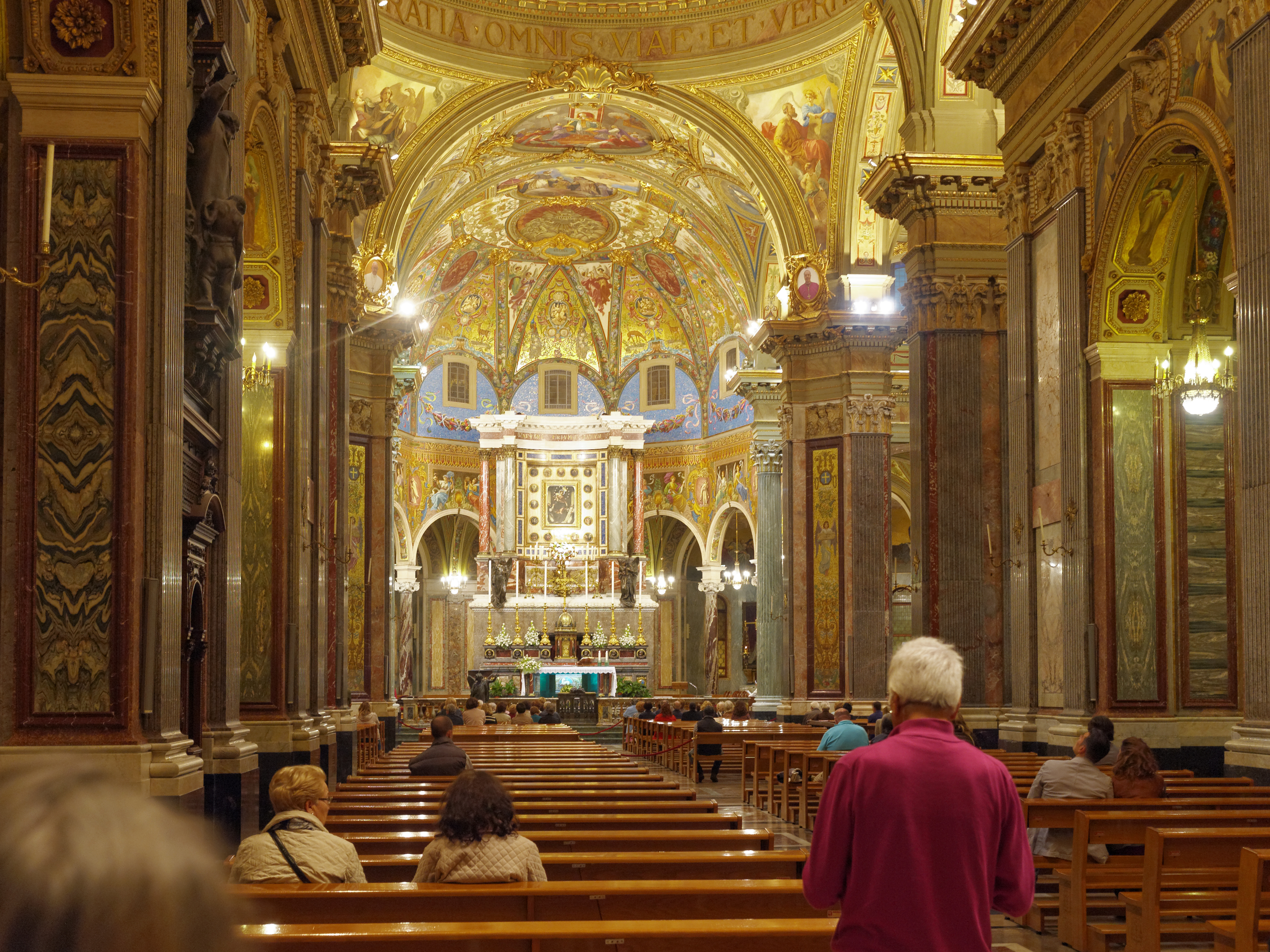 Blick in die Kirche Beata Vergine del Santo Rosario di Pompei durch das Kirchenschiff auf den Altar, in Pompei, Kampanien, Italien